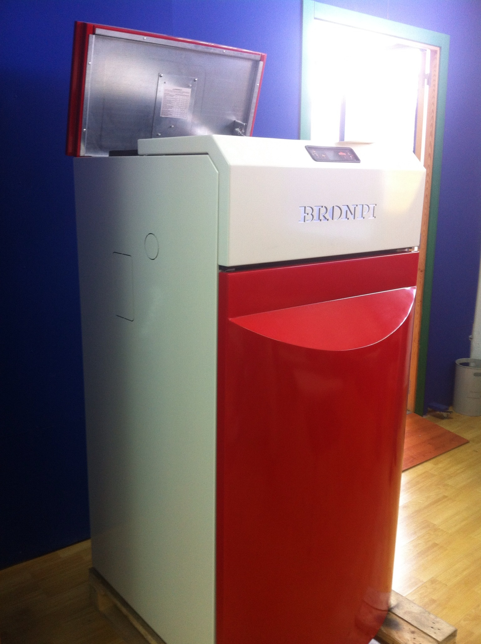 Caldera de biomasa Bronpi hydro plus pellets y hueso de aceituna